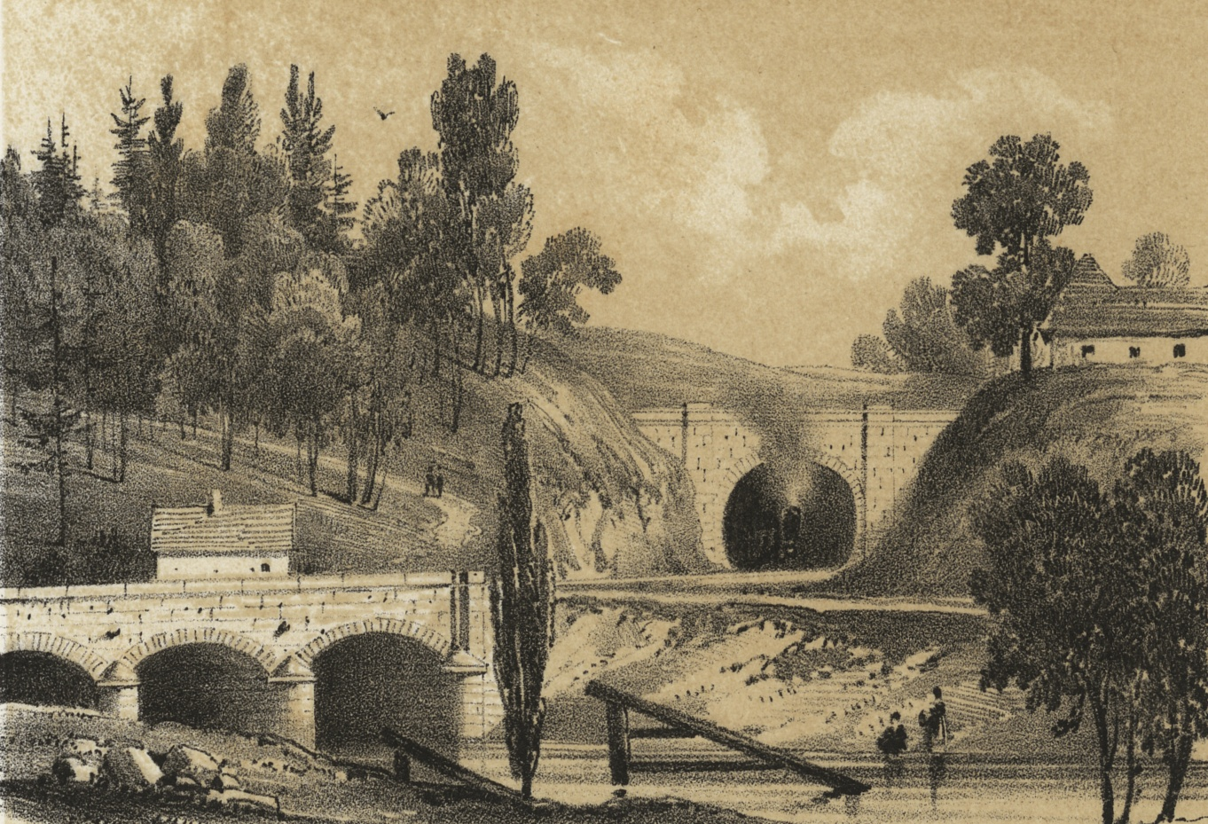 Überwölbter Einschnit bei Budigsdorf